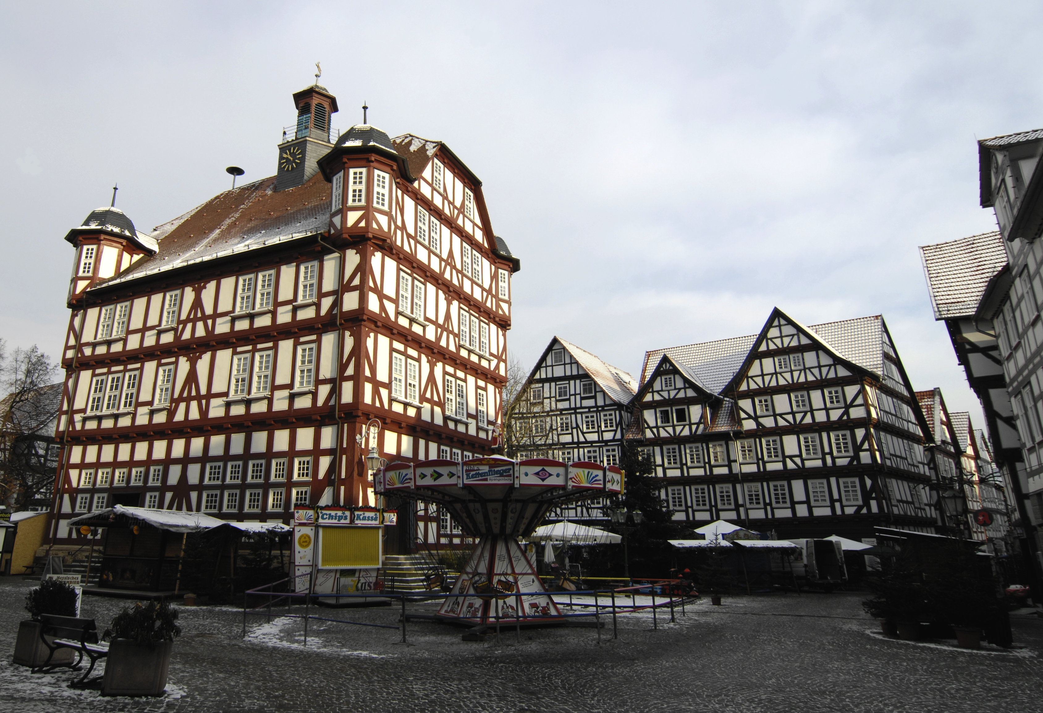 Melsungen, Rathaus von der Fritzlarer Straße gesehen, Fachwerk, Fulda